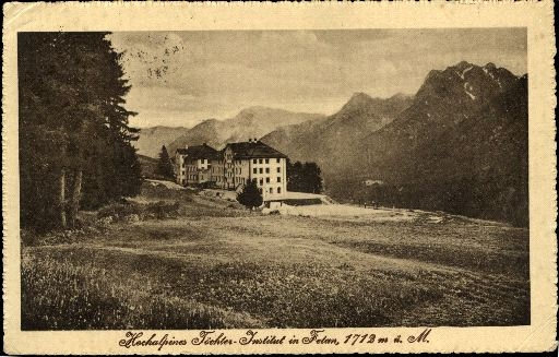 Hochalpines Töchterinstitut Fetan (Unterengadin), historische Ansichtskarte